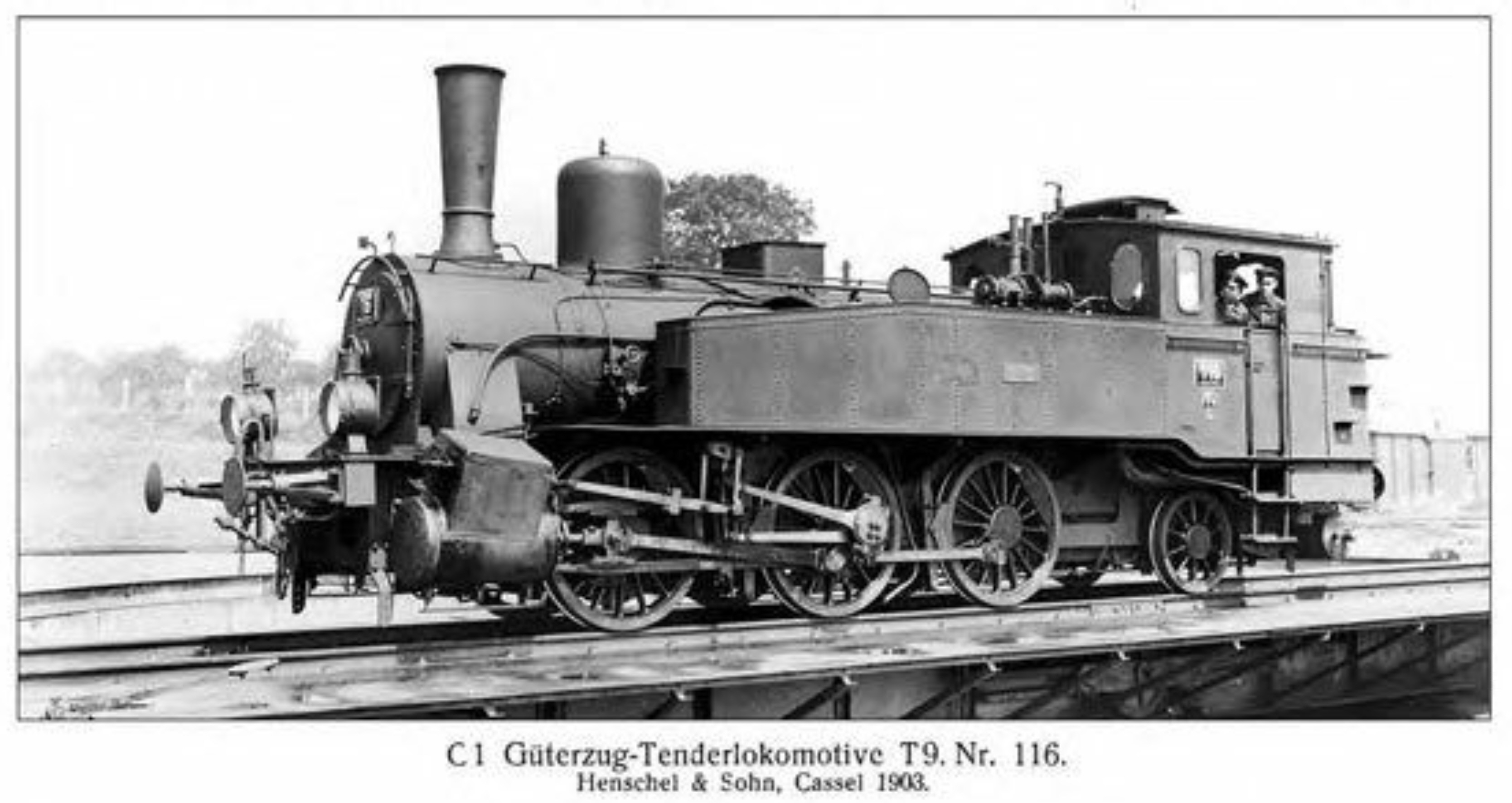 Damplokomotive der Bauart T 9 der Lübeck-Büchener Eisenbahn, Nr. 116 (1938 als 90 242 zur Deutschen Reichsbahn)